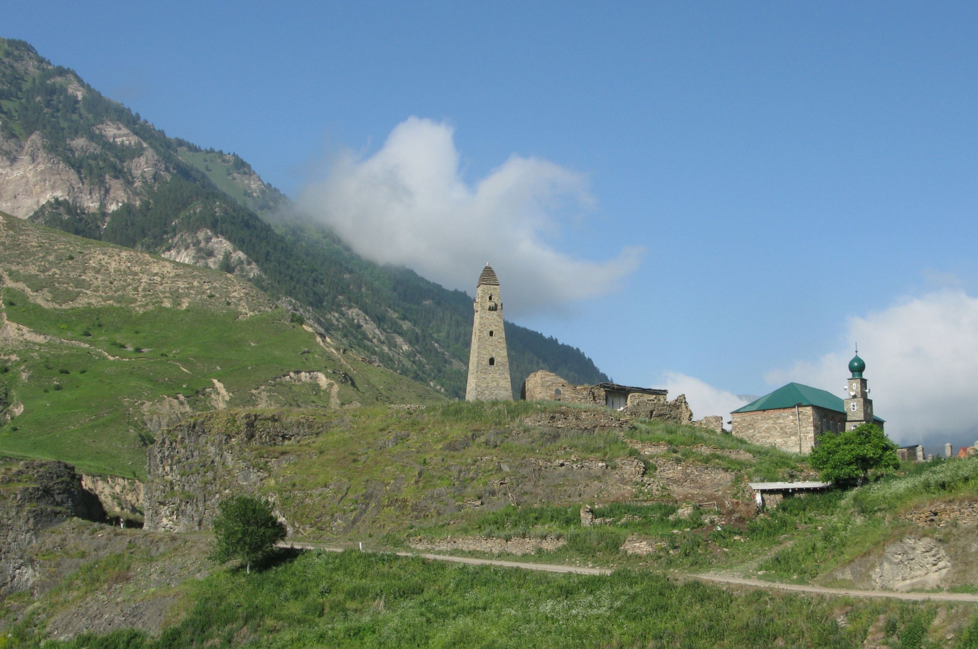 Застройка селения Химой (Чеченская Республика, Шали, селение Химой, из село Шатой по горной дороге до село Химой)